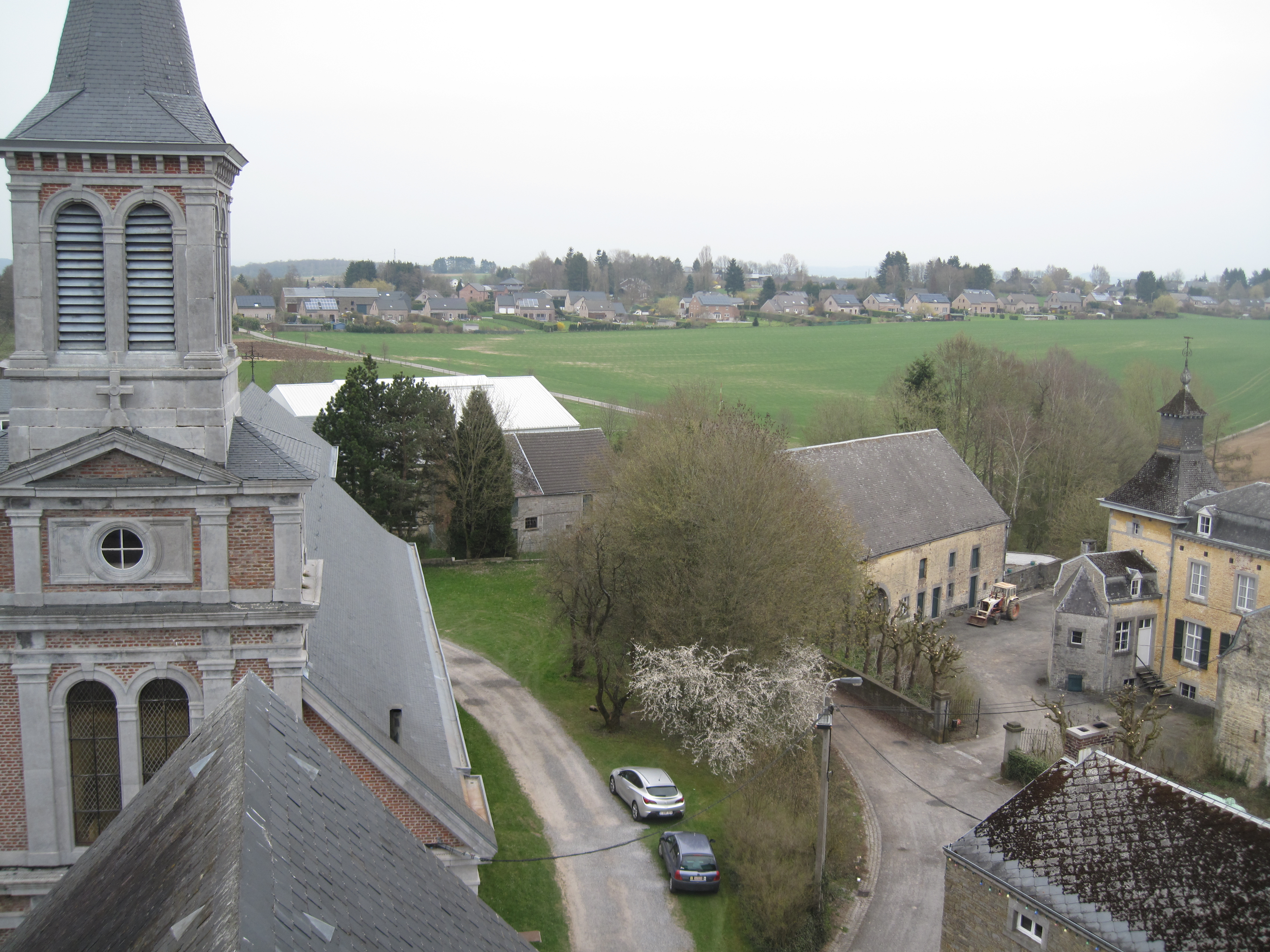 vue prise depuis la Tour de Justice